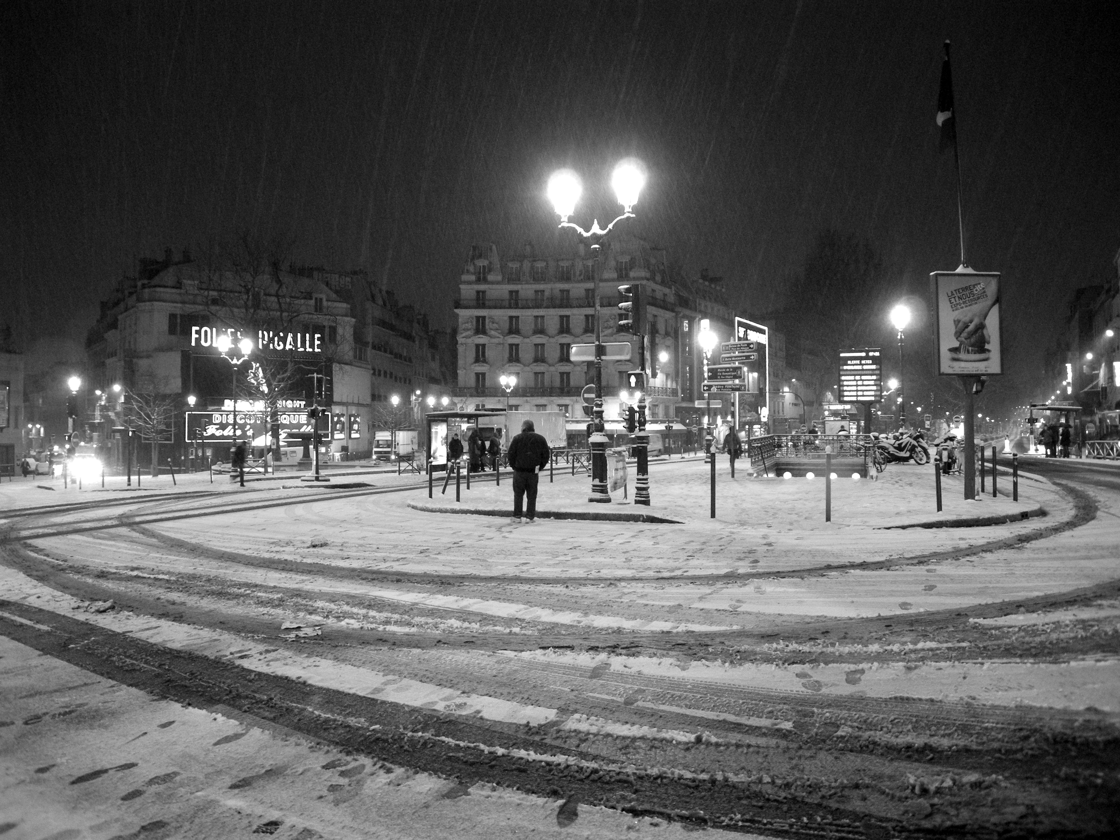 Place Pigalle, Paris IXe, France